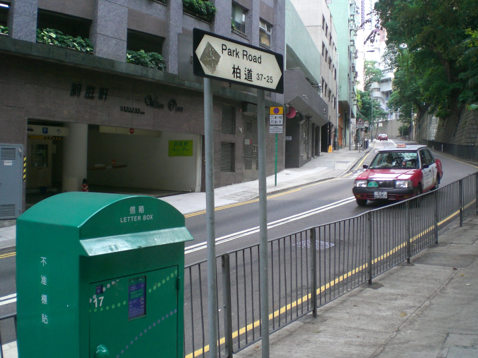 港島西半山區柏道